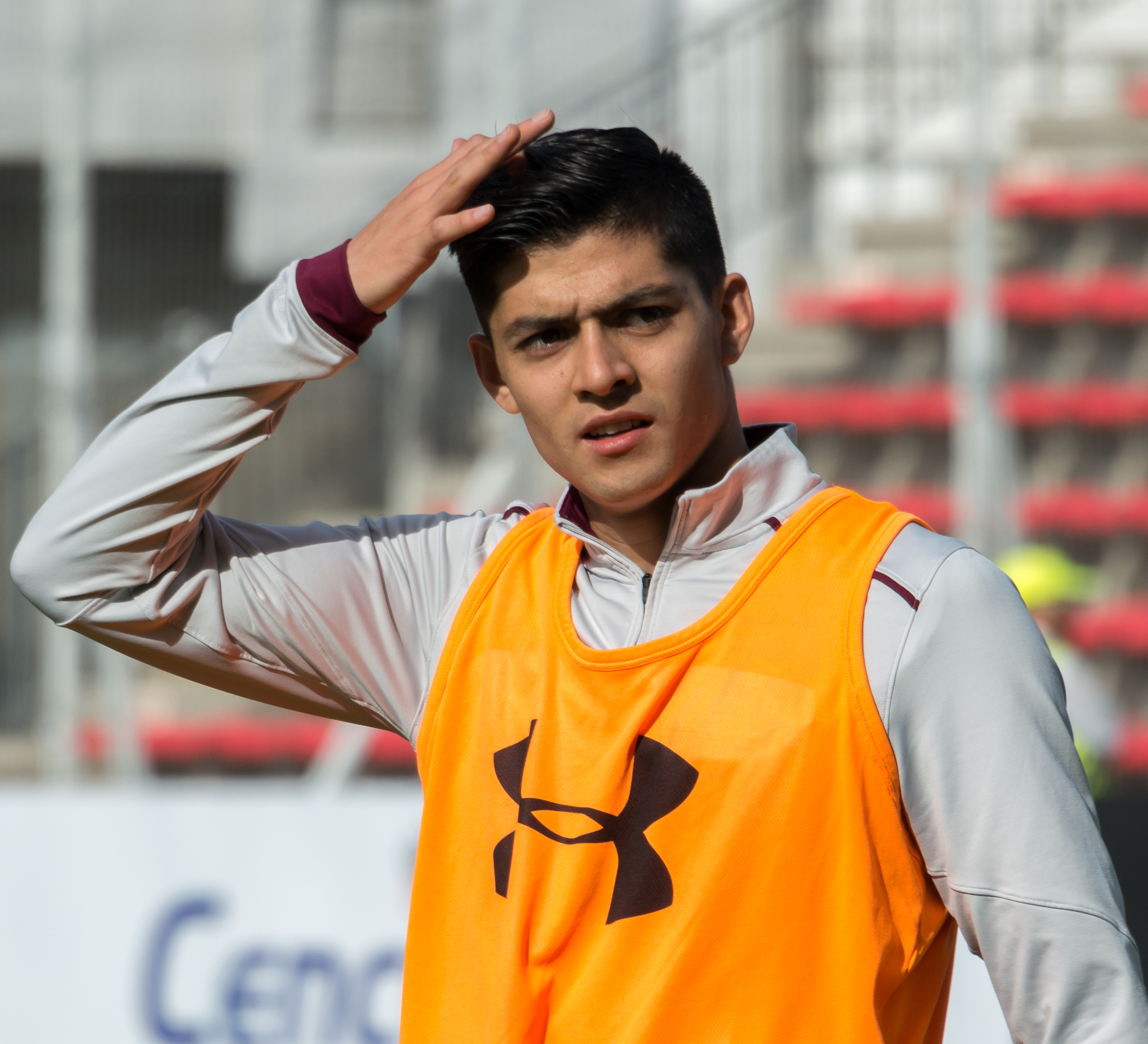 Cristián Gutiérrez, Unión La Calera v Colo-Colo, Estadio Municipal Nicolás Chahúan Nazar, La Calera, Región de Valparaíso, Chile.